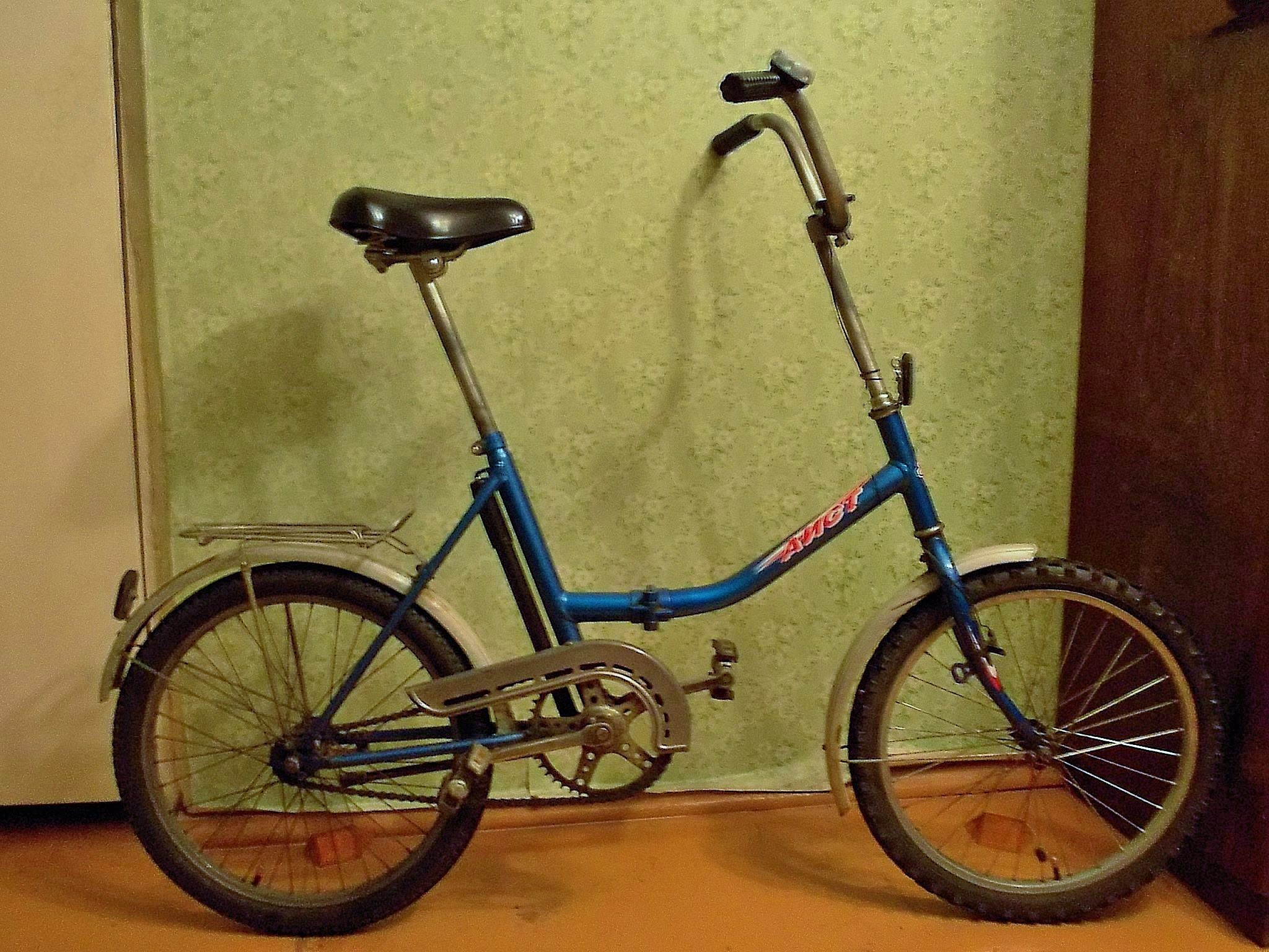 Складной Аист 2004-го года выпуска.